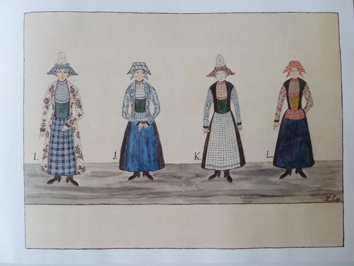 Streekdracht Hindeloopen door Hendrik Lap (1824-1874)